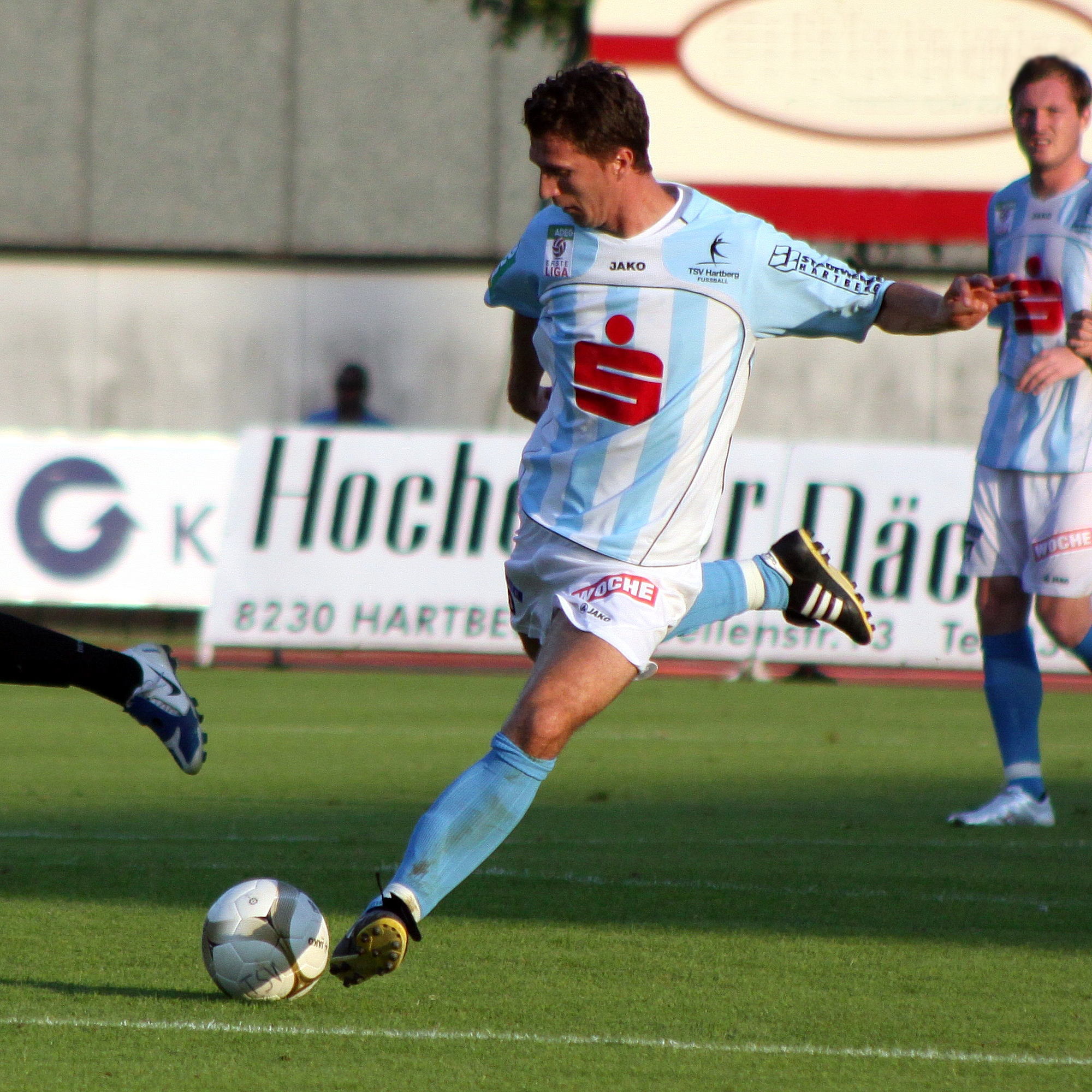 Igor Sekic - TSV Hartberg (1)